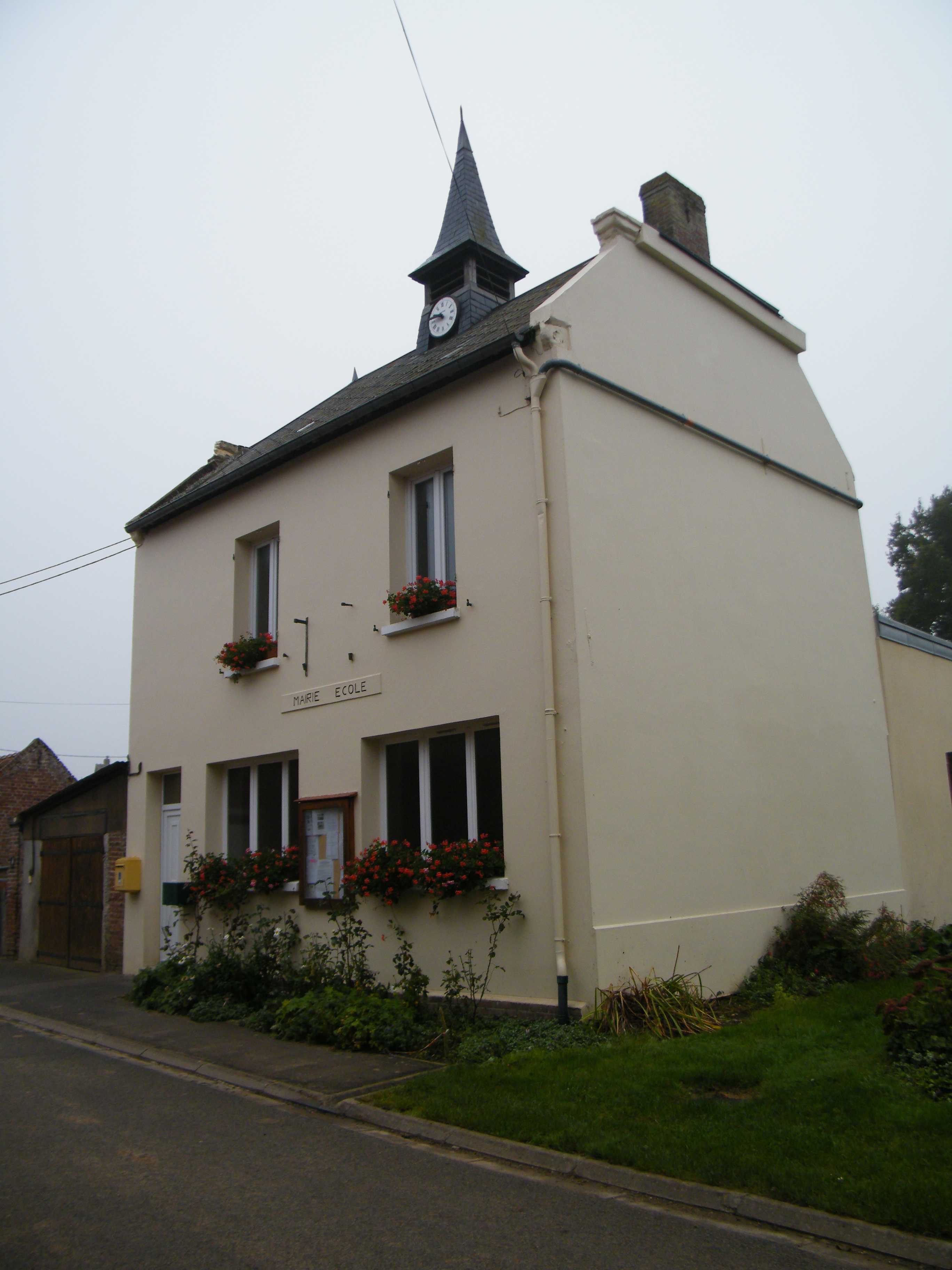 Bâtiments communaux.